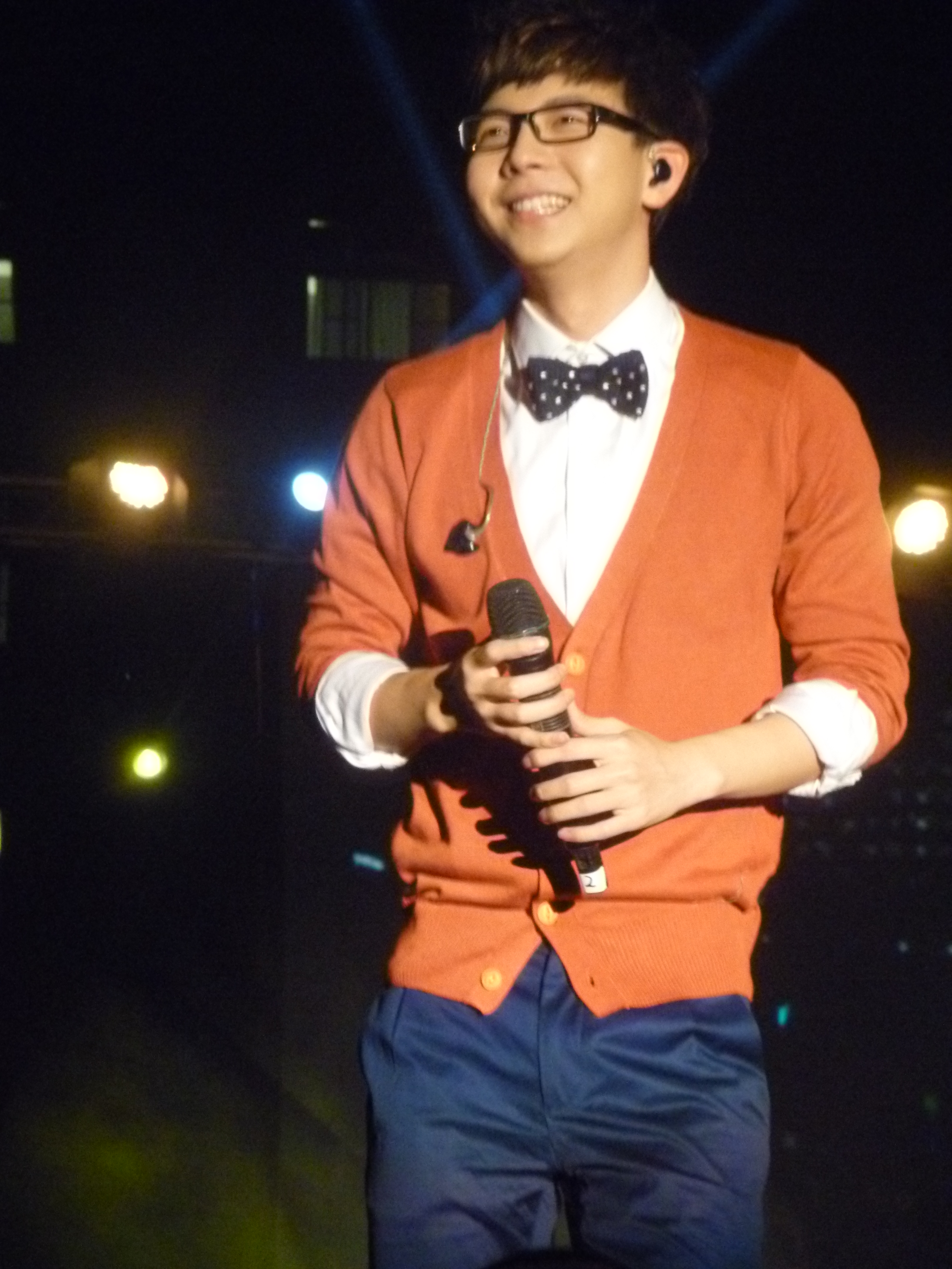 胡夏在南台科大《Maybe》畢業演唱會